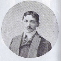 Der chilenische Dichter Carlos Pezoa Véliz (1879-1908)